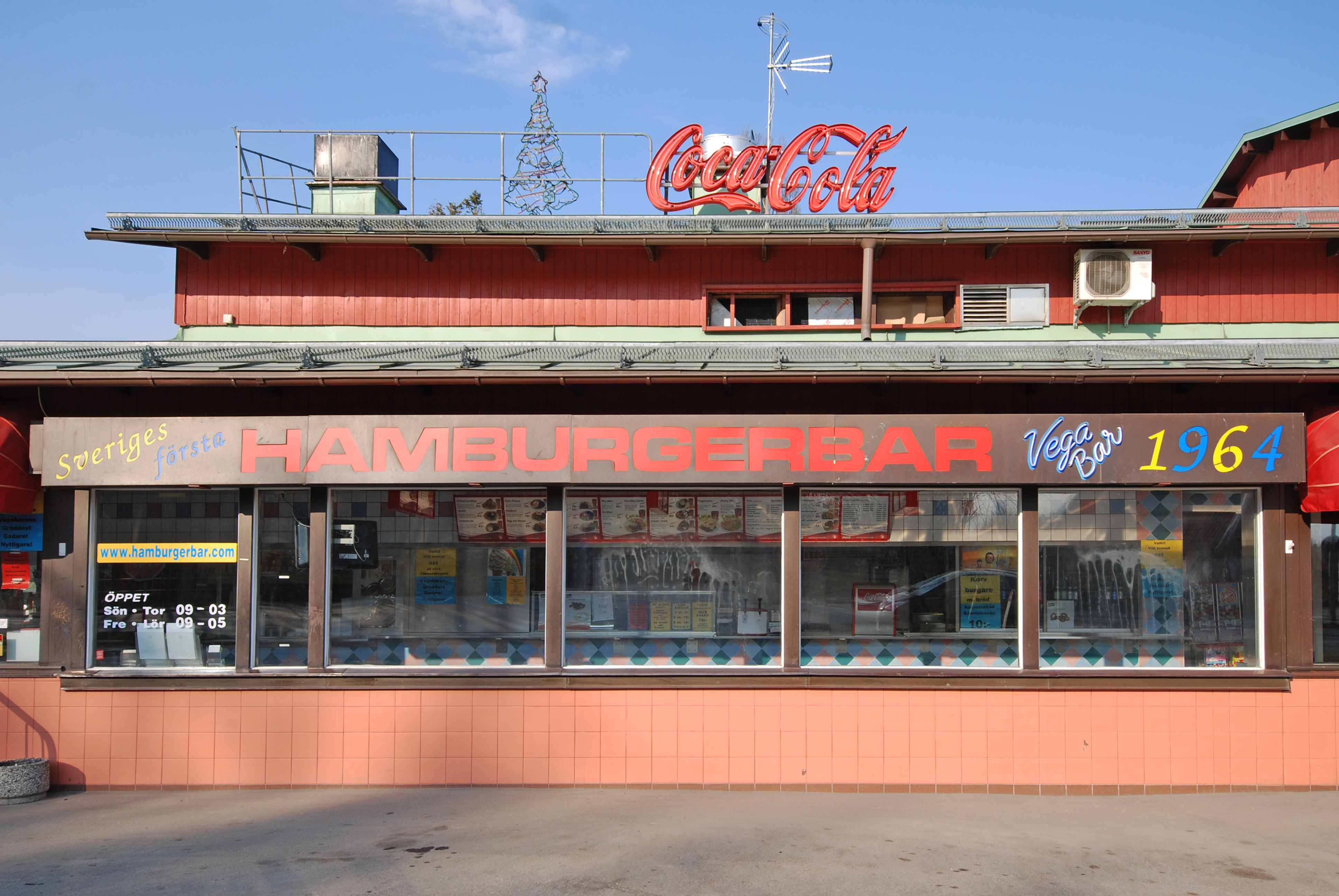 Vega Bar